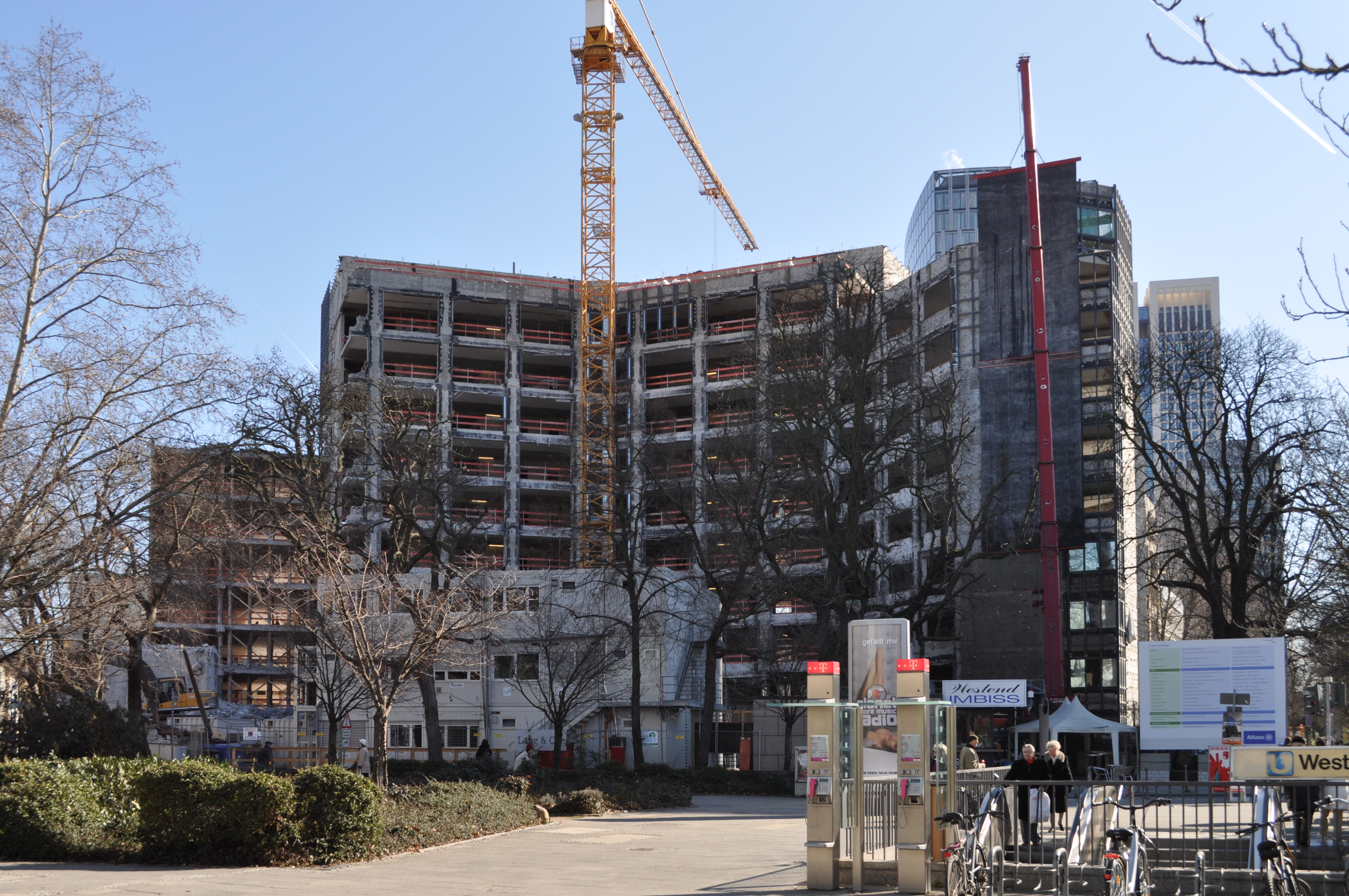 Entkerntes Triton-Haus in Frankfurt während der Renovierung